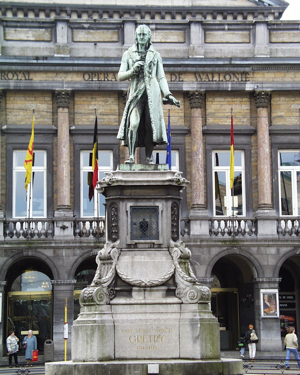 Statue de A.M. Grétry devant l'Opéra Royal de Wallonie à Liège ; l'urne sous la statue derrière le grillage contient son coeur. Photo perso J. THURION mars 1999 Belgavox